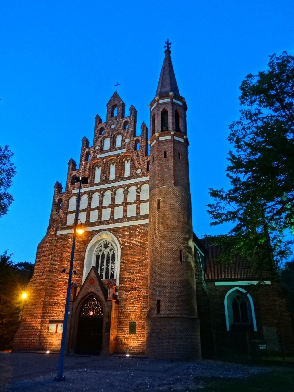 Kościół pobernardyński p.w. Najświętszej Maryi Panny Królowej Pokoju, zbud. 1552-1557, do 1830 kościół klasztorny bernardynów bydgoskich, od 1866 r. garnizonowy